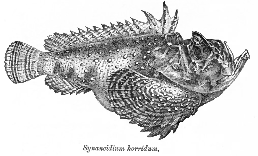 Synancidium horridum = Synanceia horrida (Linnaeus, 1766)